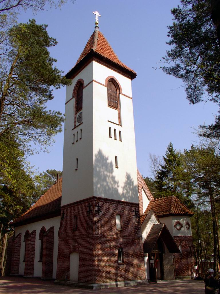 Храм преп.Серафима Саровского